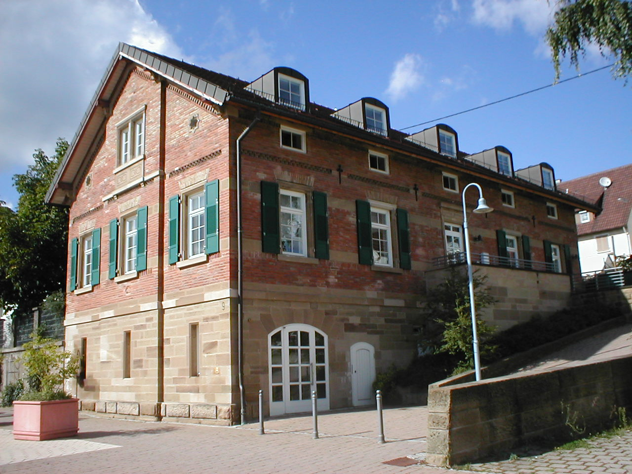 Seyboldsche Stiftung in Nordheim, Gebäude errichtet 1867